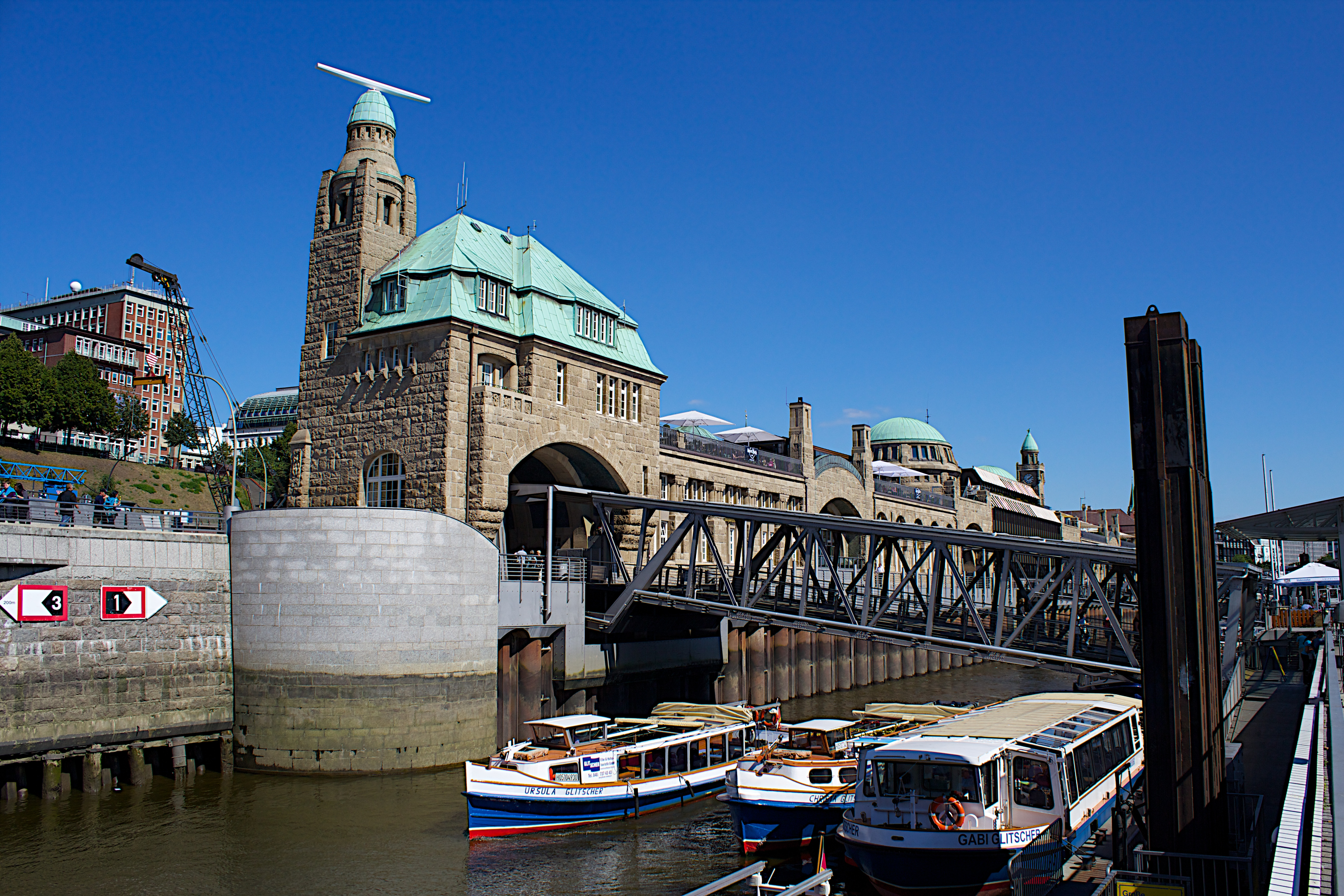 Hamburg